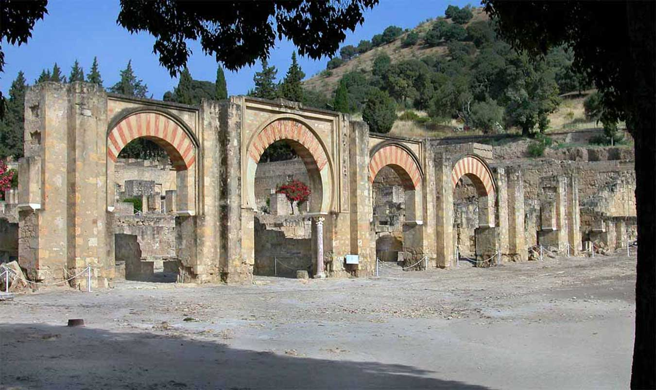 El Gran Pórtico